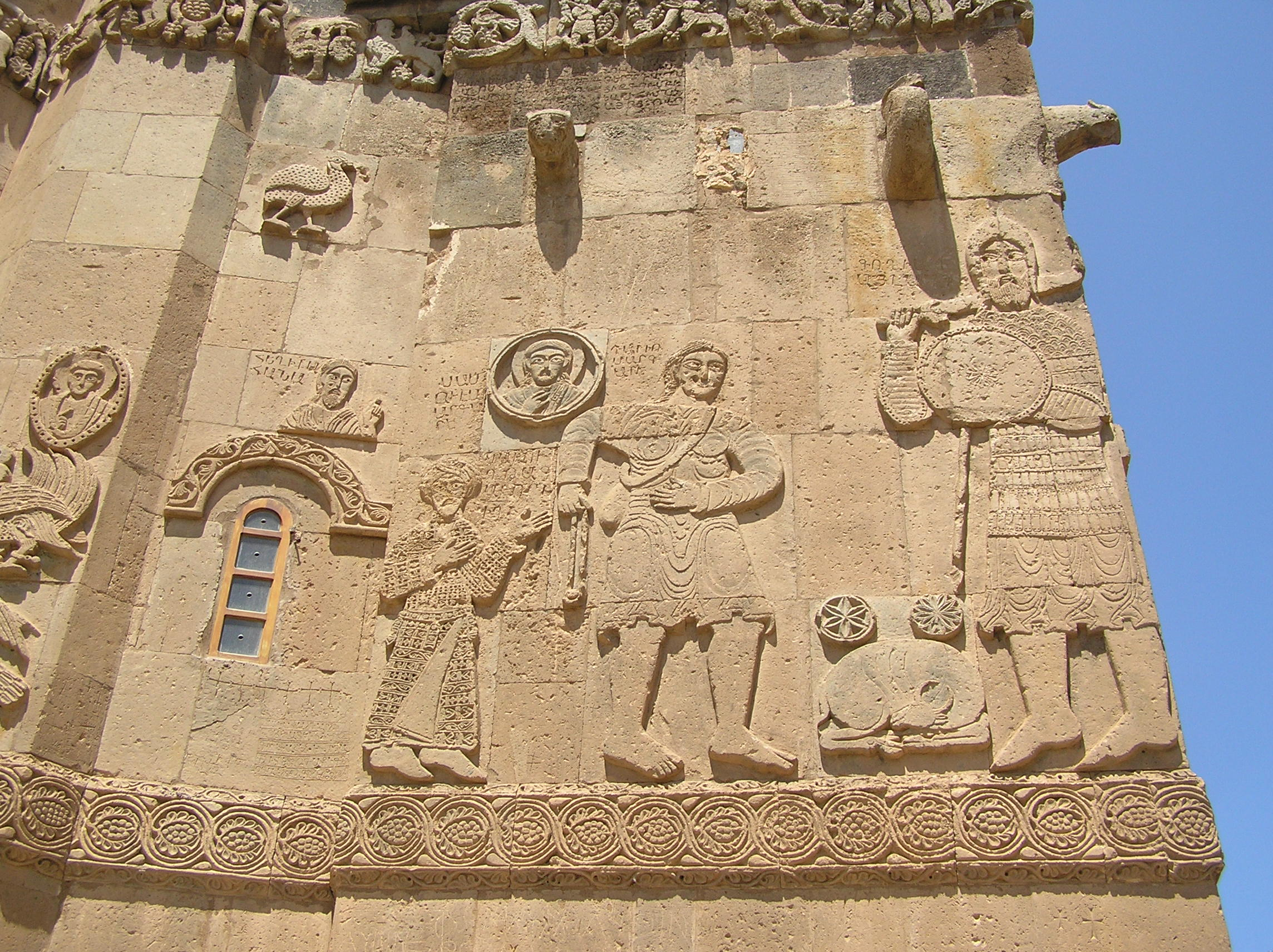 A detail of David and Goliath from the restored 'Cathedral of the Holy Cross' on Akdamar Island on Lake Van, August 2007.